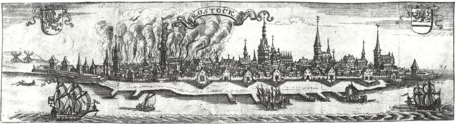 Brand Rostocks von 1677